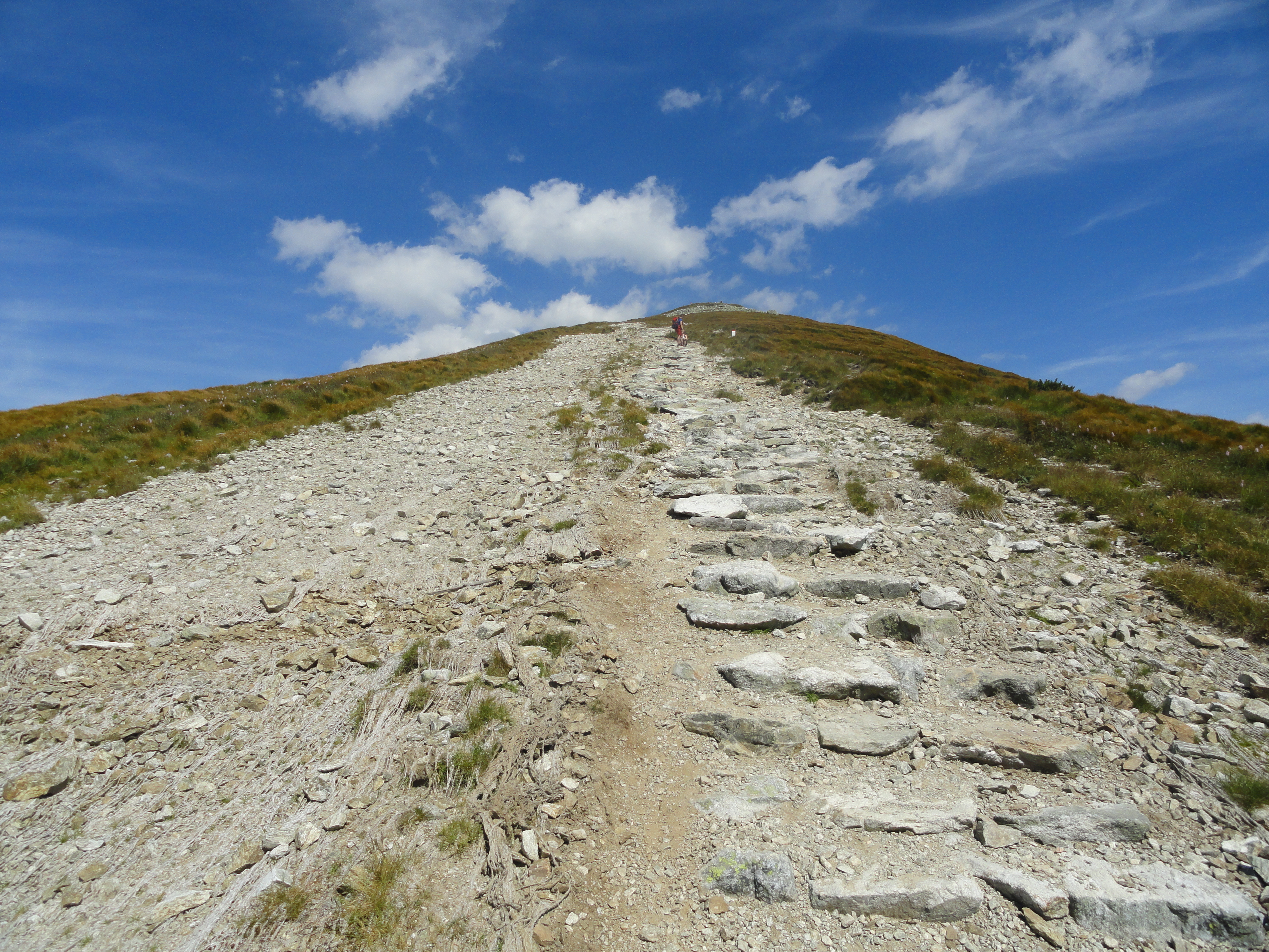 Wejście na Kopę Kondracką od strony Małołączniaka This is a photography of protected area with CRFOP ID PL.ZIPOP.1393.PN.14